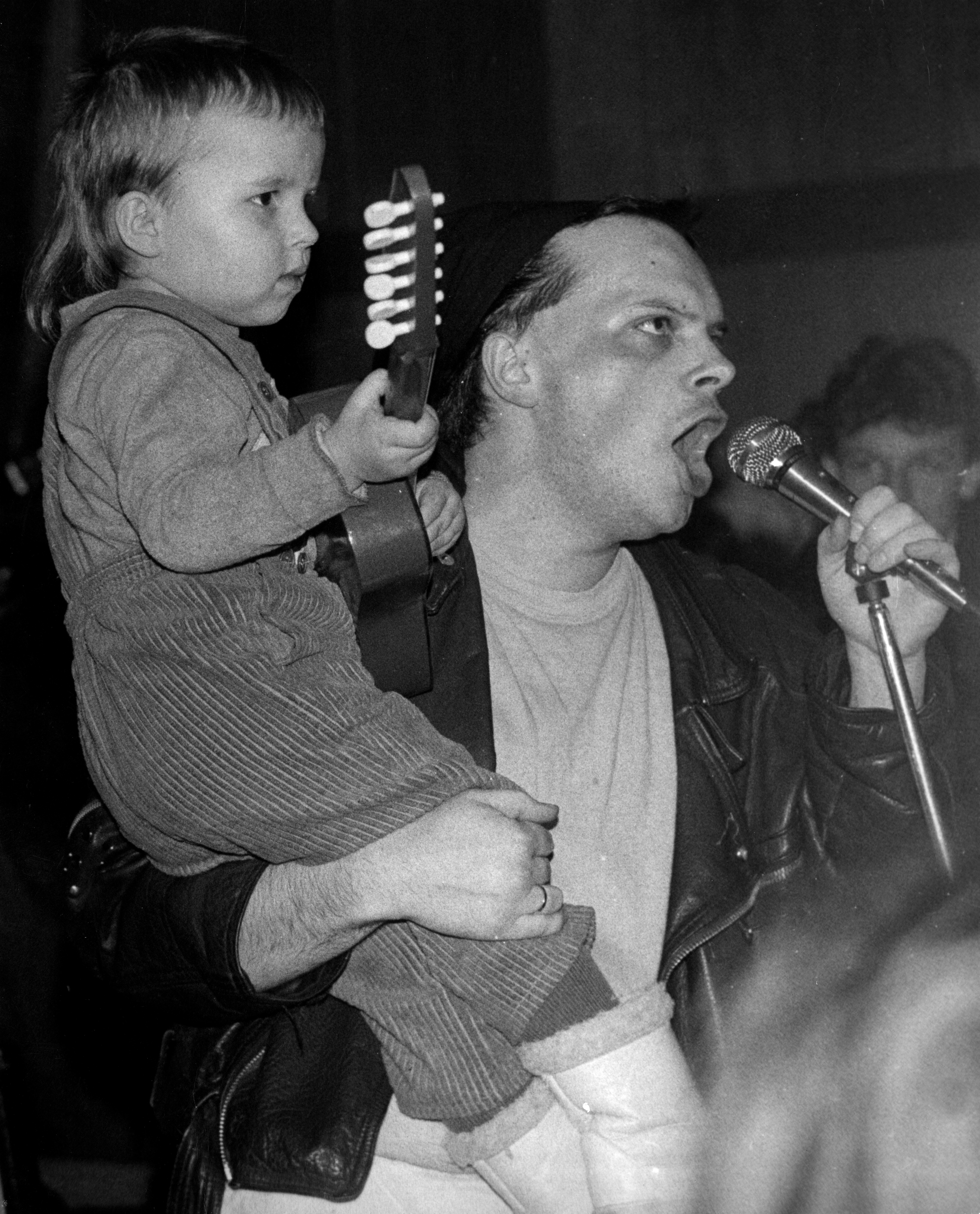 Podczas koncertu zespołu Big Cyc w Klubie Studenckim OLIMP na Osiedlu Lumumbowo w Łodzi. Rok 1988. Na ręku - syn Tymoteusz